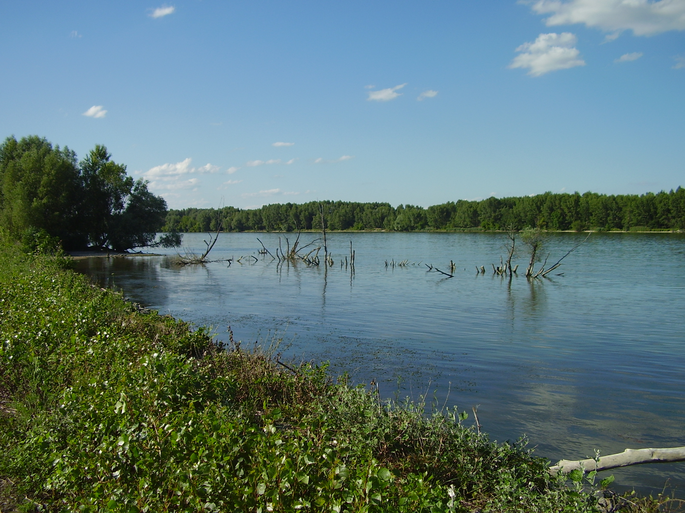 Bratislava